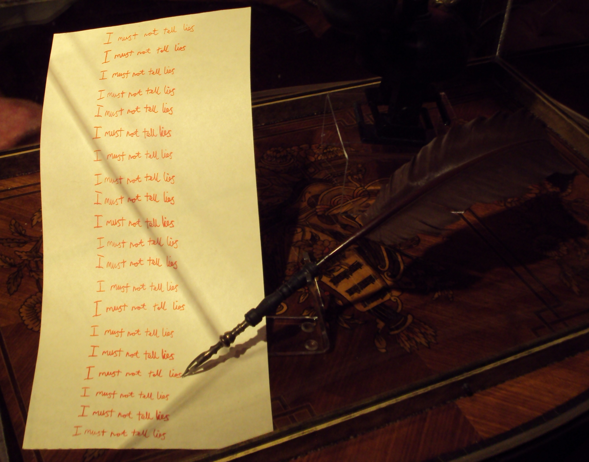 Bloedveer (Engels: Black Quill) tijdens Harry Potter: The Exhibition in Brussel (België)